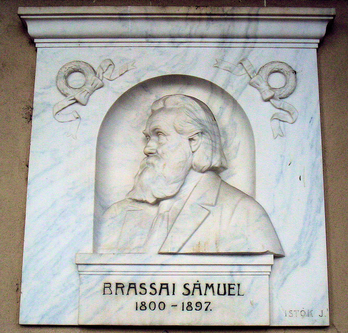 Brassai Sámuel nyelvész, filozófus, természettudós szobra a szegedi Pantheonban. Istók János (1873–1972) alkotása (1930) – – photo taken by uploader User:Csanády in 2006.